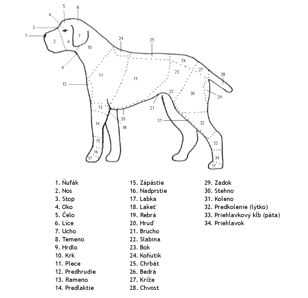 Popis: Telo psa Zdroj: Vlastný obrázok (inšpirované podľa obrázka na str. 15. knihy: Najman, J.; Novotný, J.: Atlas plemen psů. Státní zemědělské nakladatelství Praha. 1973. ISBN07-035-73) Dátum: 2.1.2006 Autor: Prskavka Povolenie: PD Iné verzie tohto súboru: nie